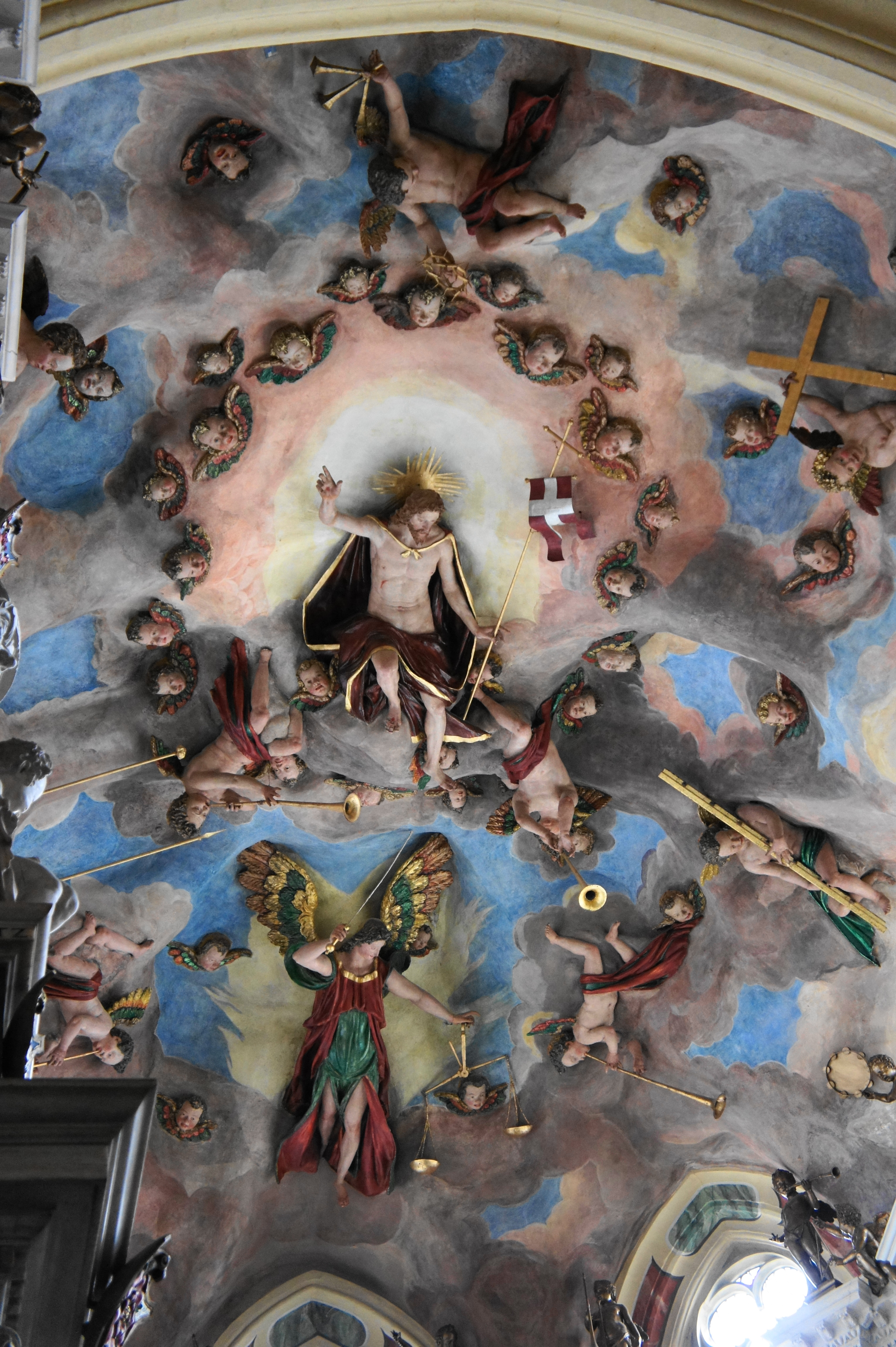 Der Dom zu Freiberg; Begräbniskapelle